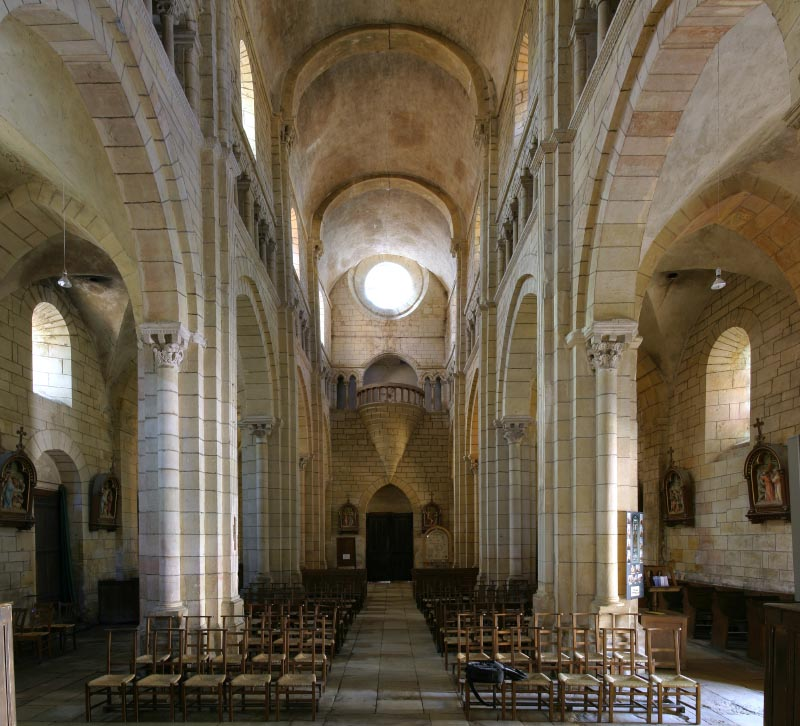 Nef centrale de l'église de Semur-en-Brionnais prise de la croisée du transept